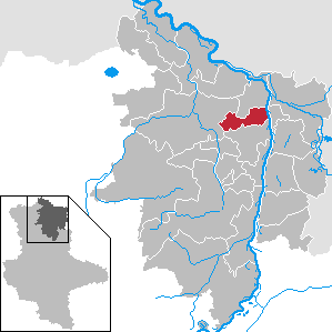 Iden im Landkreis Stendal, Sachsen-Anhalt